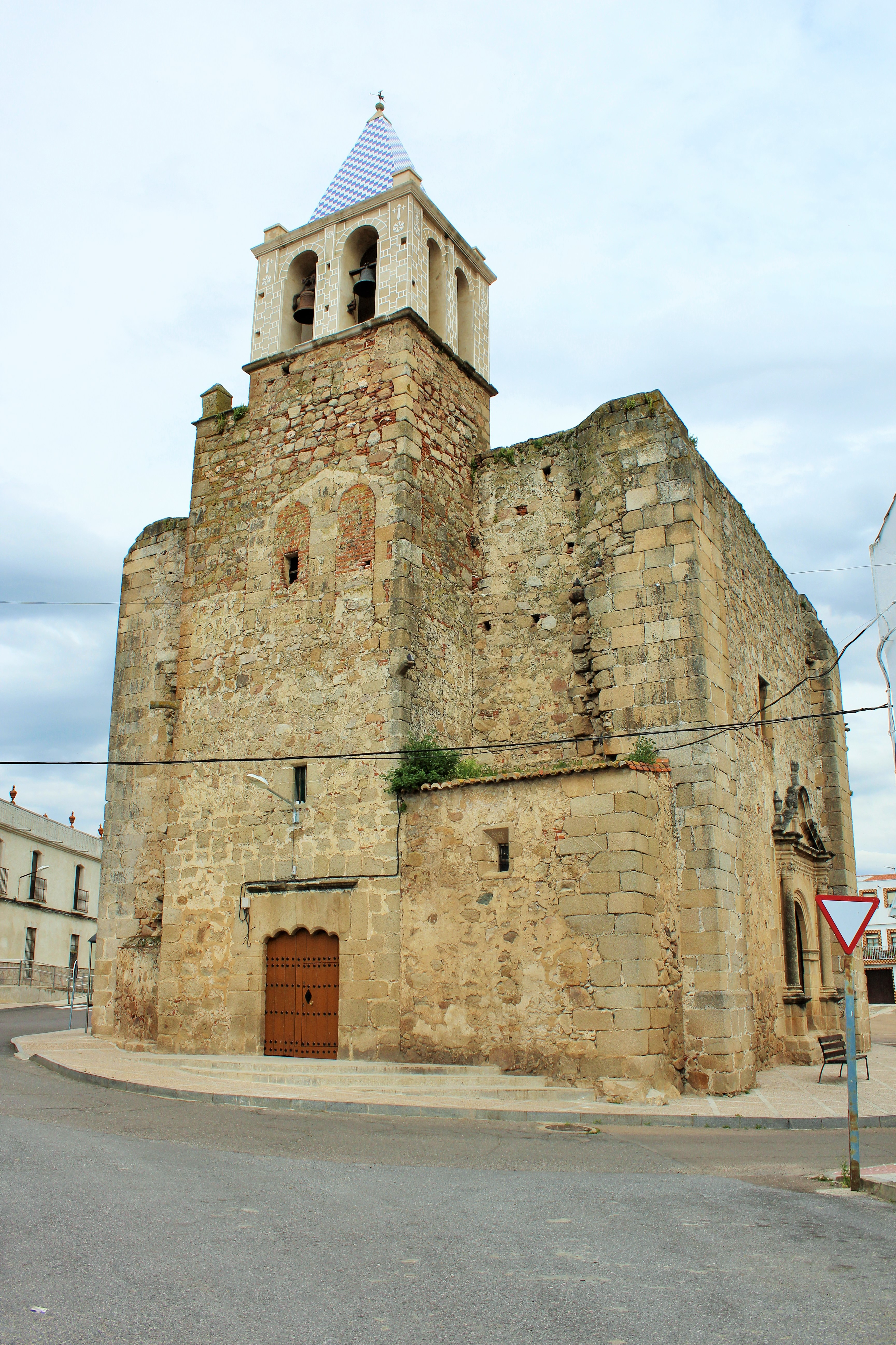 Iglesia parroquial